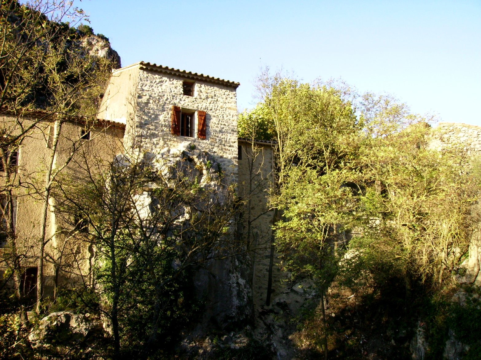 Laroque-de-Fa (France) - Maison (1)